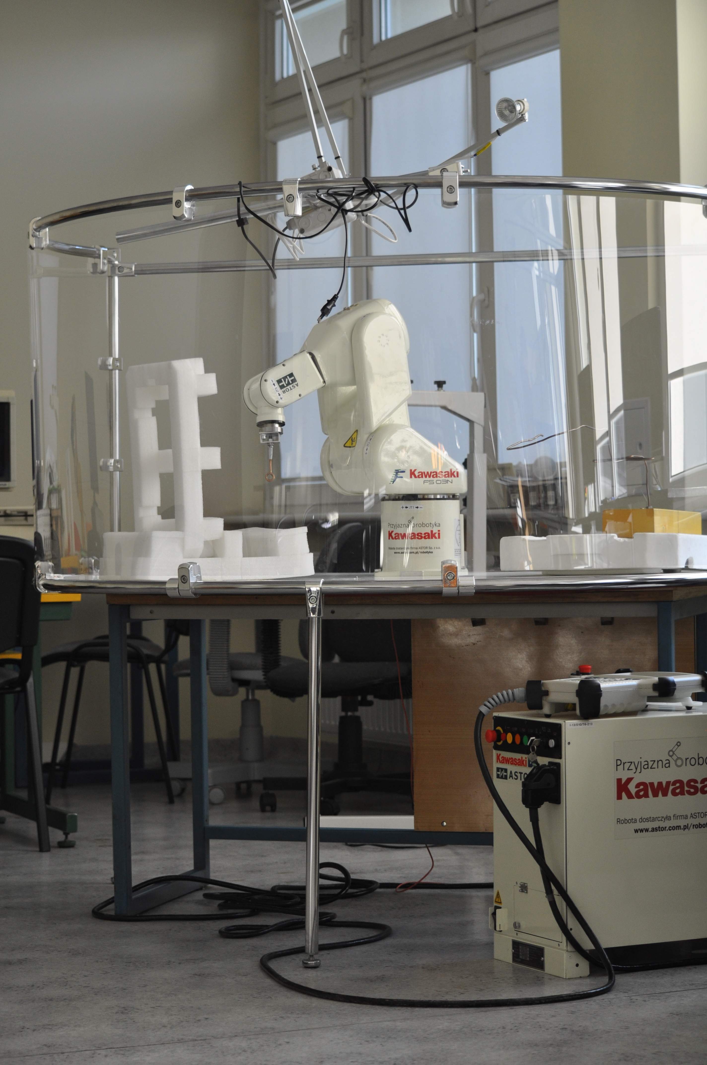 Robot Kawasaki FS03N w laboratorium Zakładu Sterowania Robotów Instytutu Automatyki Politechniki Łódzkiej. W laboratorium prowadzone są zajęcia z systemów wbudowanych i wizyjnych robotyki.